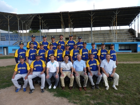 У Кіровограді, де проходить навчально - тренувальний збір Національної збірної України, гравцям та тренерському складу збірної вручили нову бейсбольну форму. На заході був присутній начальник управління фізичної культури та спорту Сергій Колодяжний.